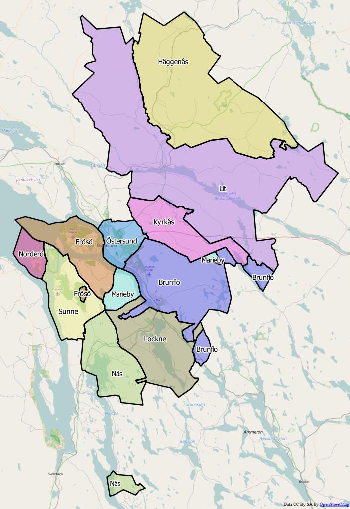 Distriktsindelningen i Östersunds kommun World file 220.33456910435450027 0 0 -220.33456910435450027 1582169.8127148118801415 9252881.24726693890988827